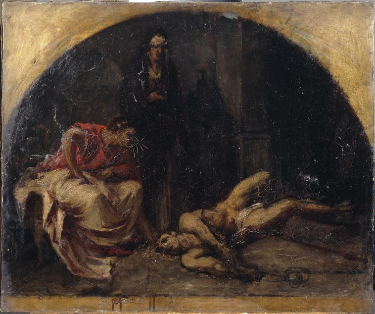 Néron et Locuste essayant des poisons sur un esclave. Lille, Palais des Beaux-Arts. huile sur toile. 0.495m x 0.61m.